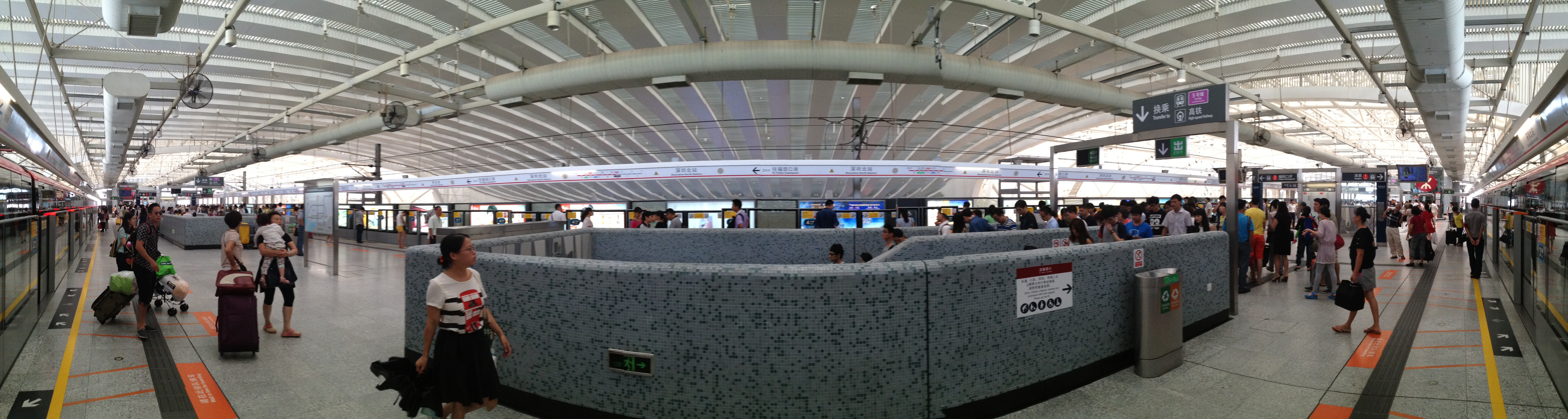 港铁深圳4号线深圳北站月台全景图